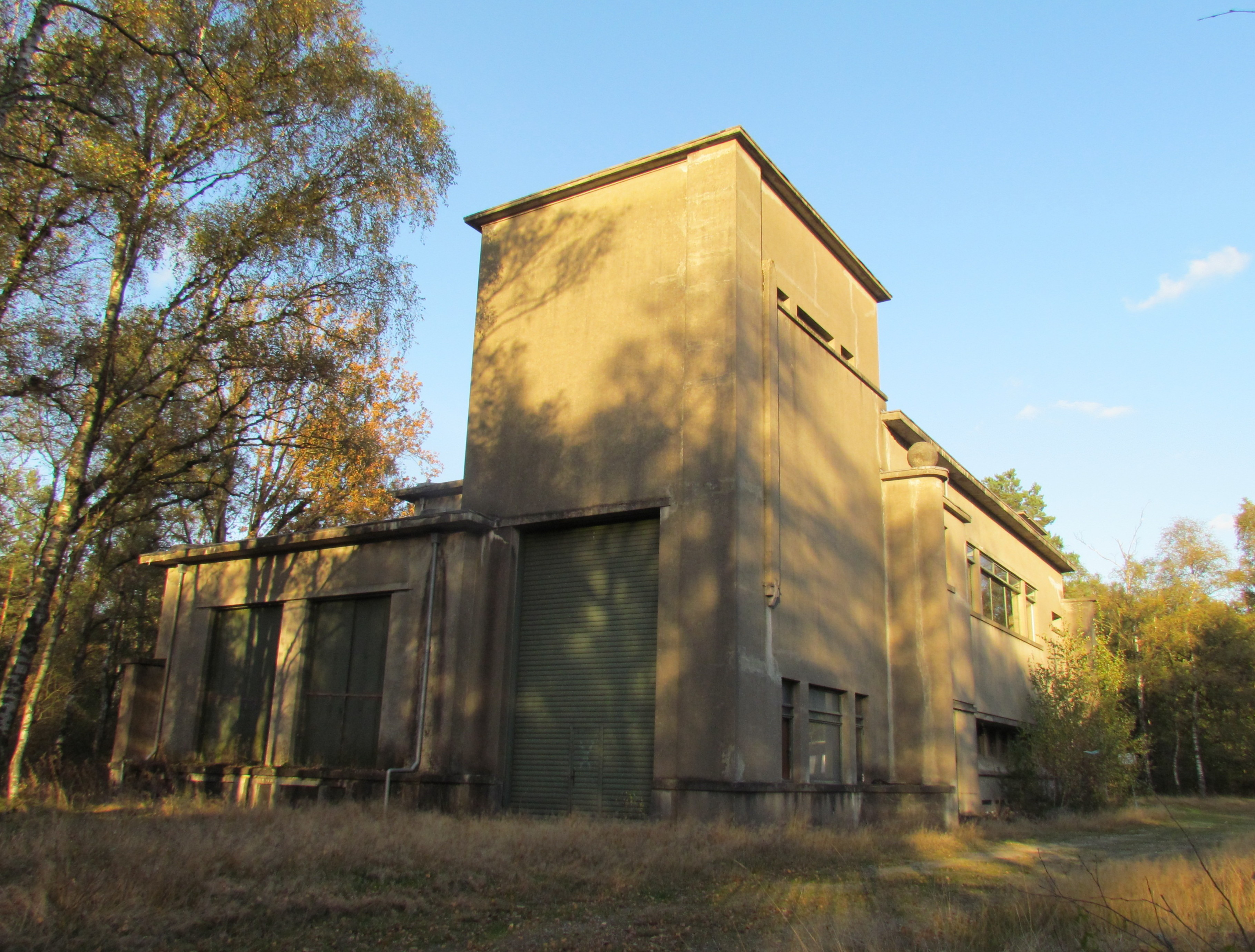 50 kV-station (PGEM) uit de jaren 30, bij Radio Kootwijk (NL)